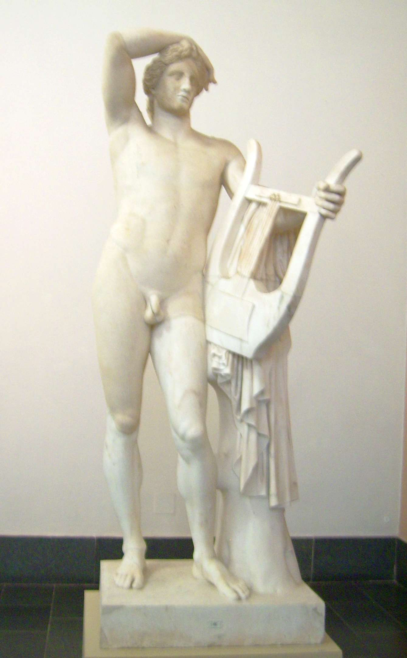 Apollo Kitharoidos, Marmorstatue, wohl im 2. Jahrhundert in Rom gefertigt, um 1766 von Bartolomeo Cavaceppi restauriert, danach durch Agenten von Friedrichs des Großen erworben, Höhe 213 cm, Sk 44